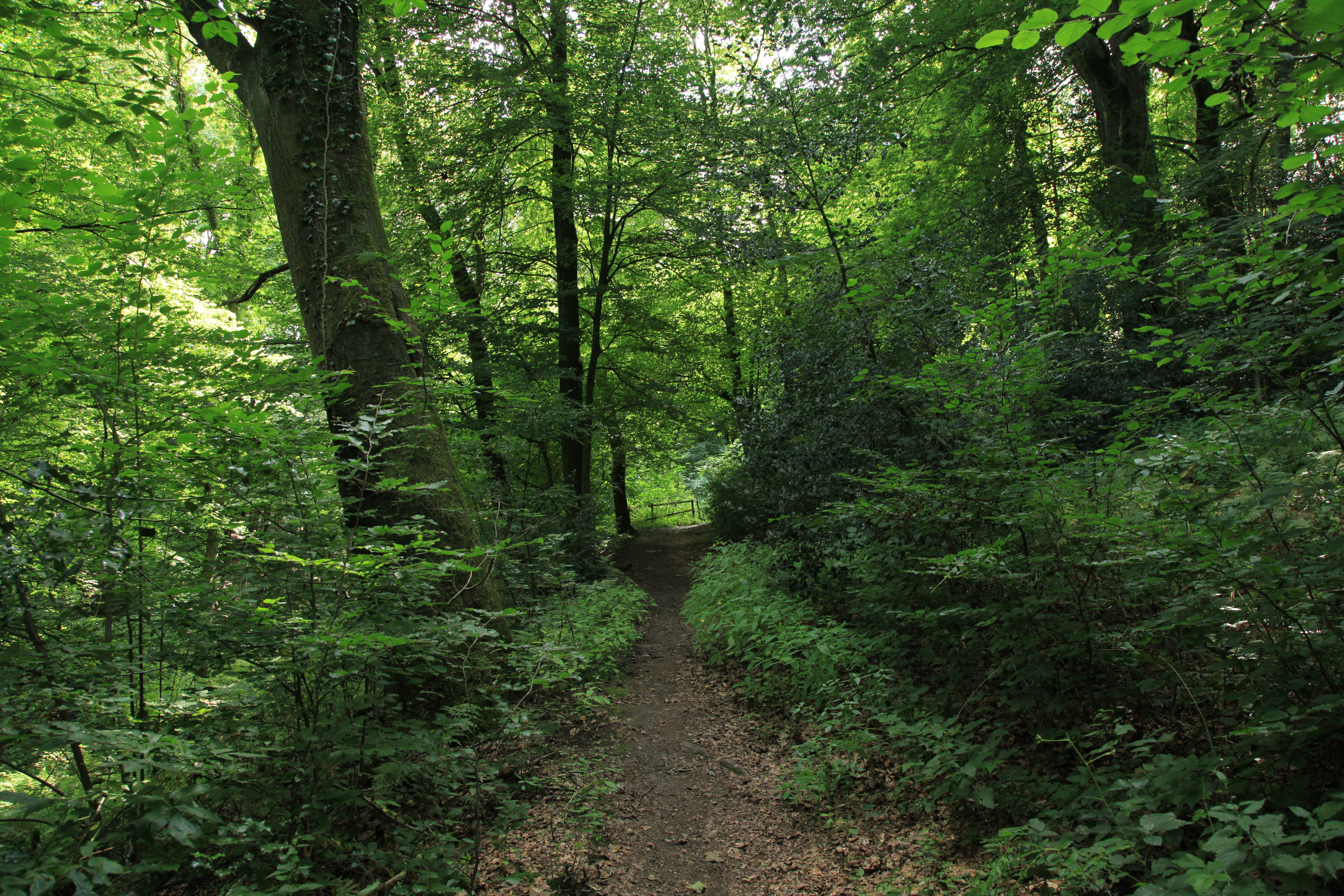 Naturschutzgebiet Waldsiepen Hevener Straße zwischen Hevener Straße und Im Lottental in Bochum